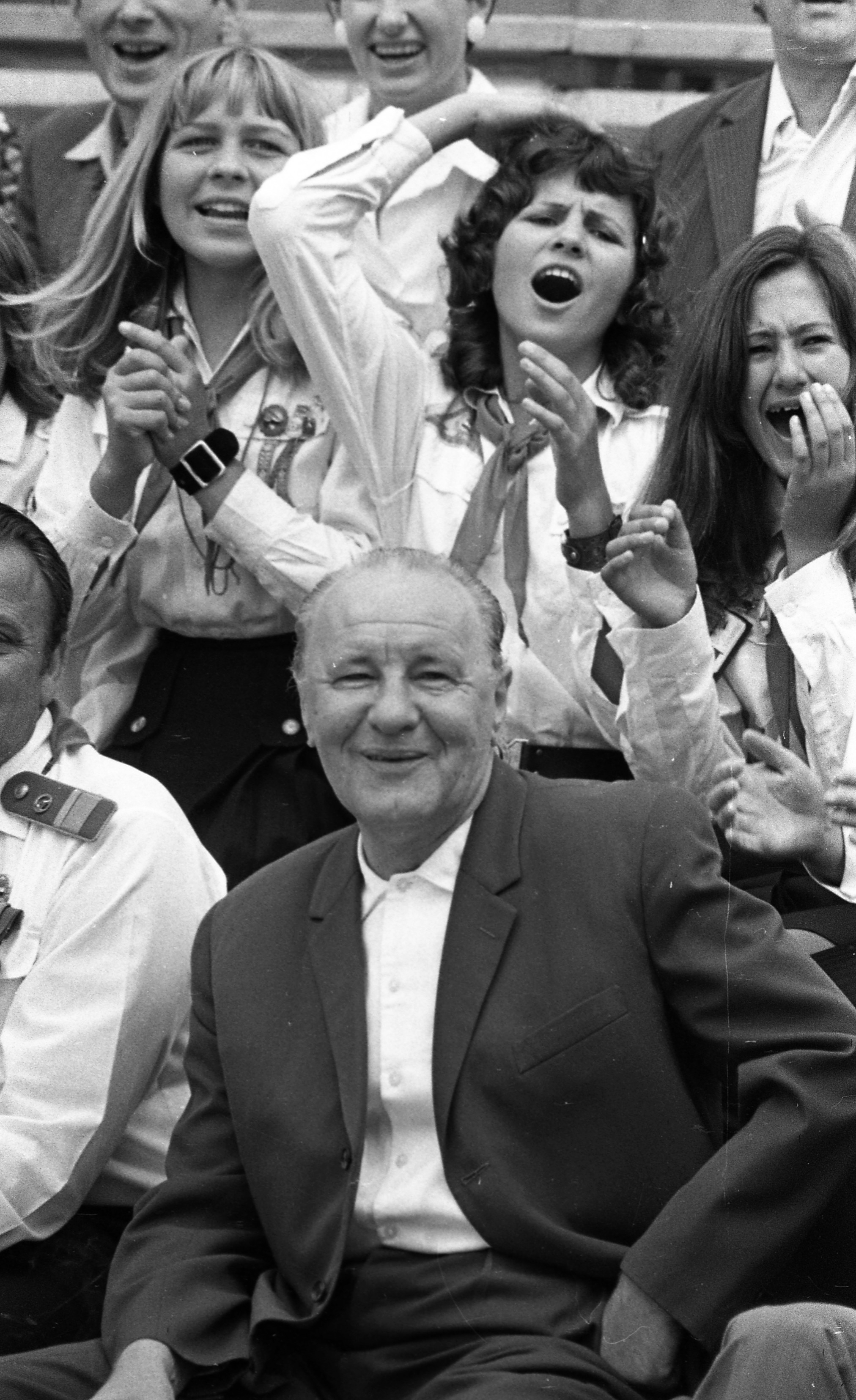 Kádár János úttörő pajtások körében, Csillebérc (Úttörőváros).